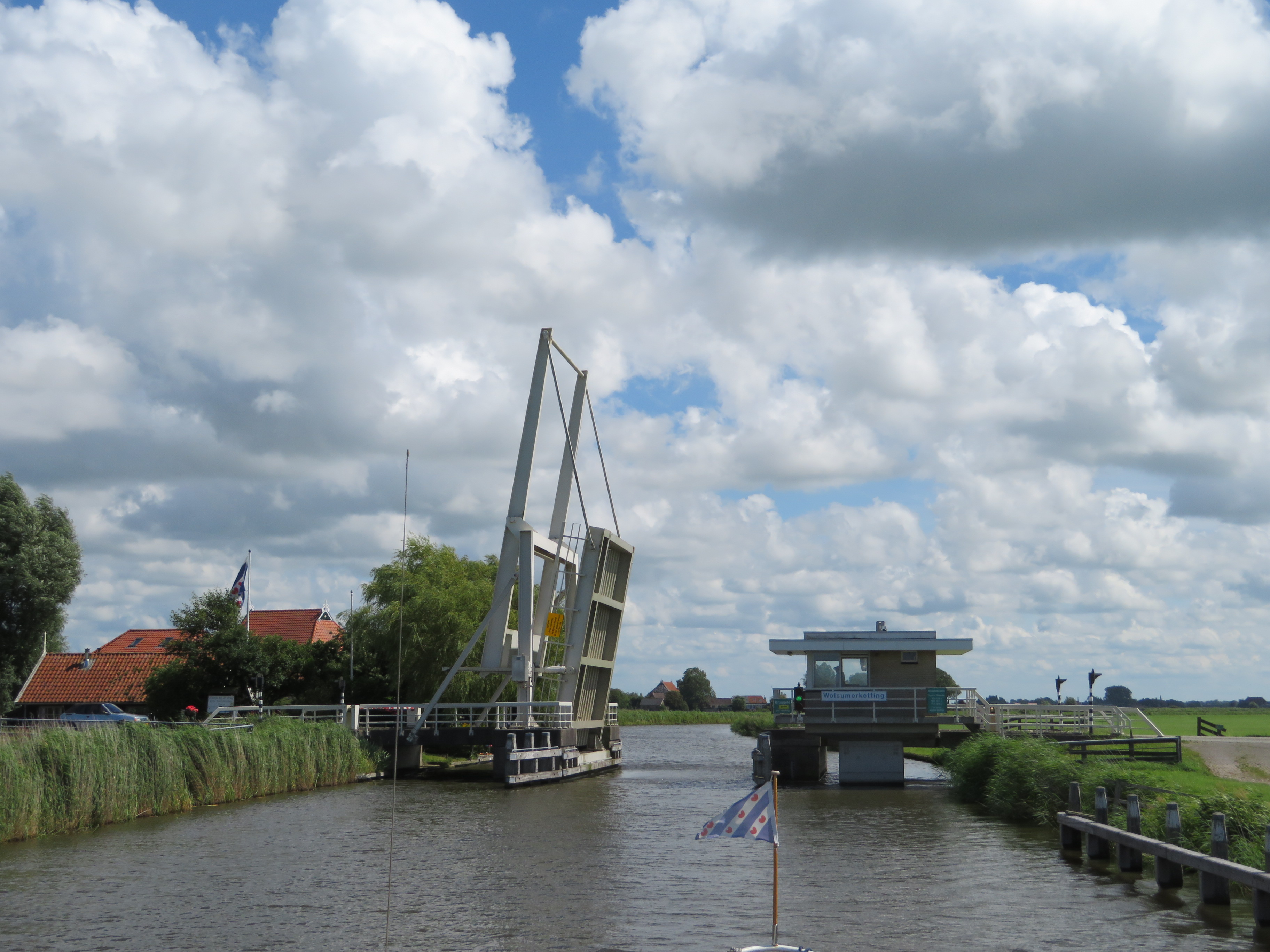 Brug over de Wijmerts bij Wolsumerketting